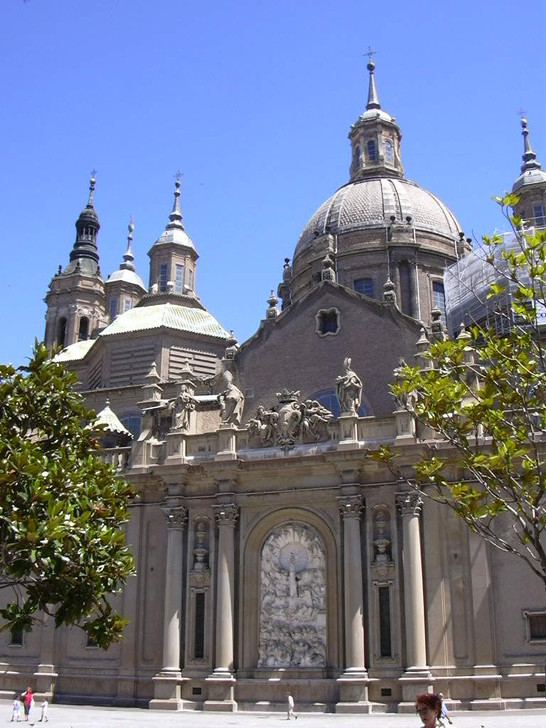 El Pilar - Vista de tramo central del lado de la plaza.